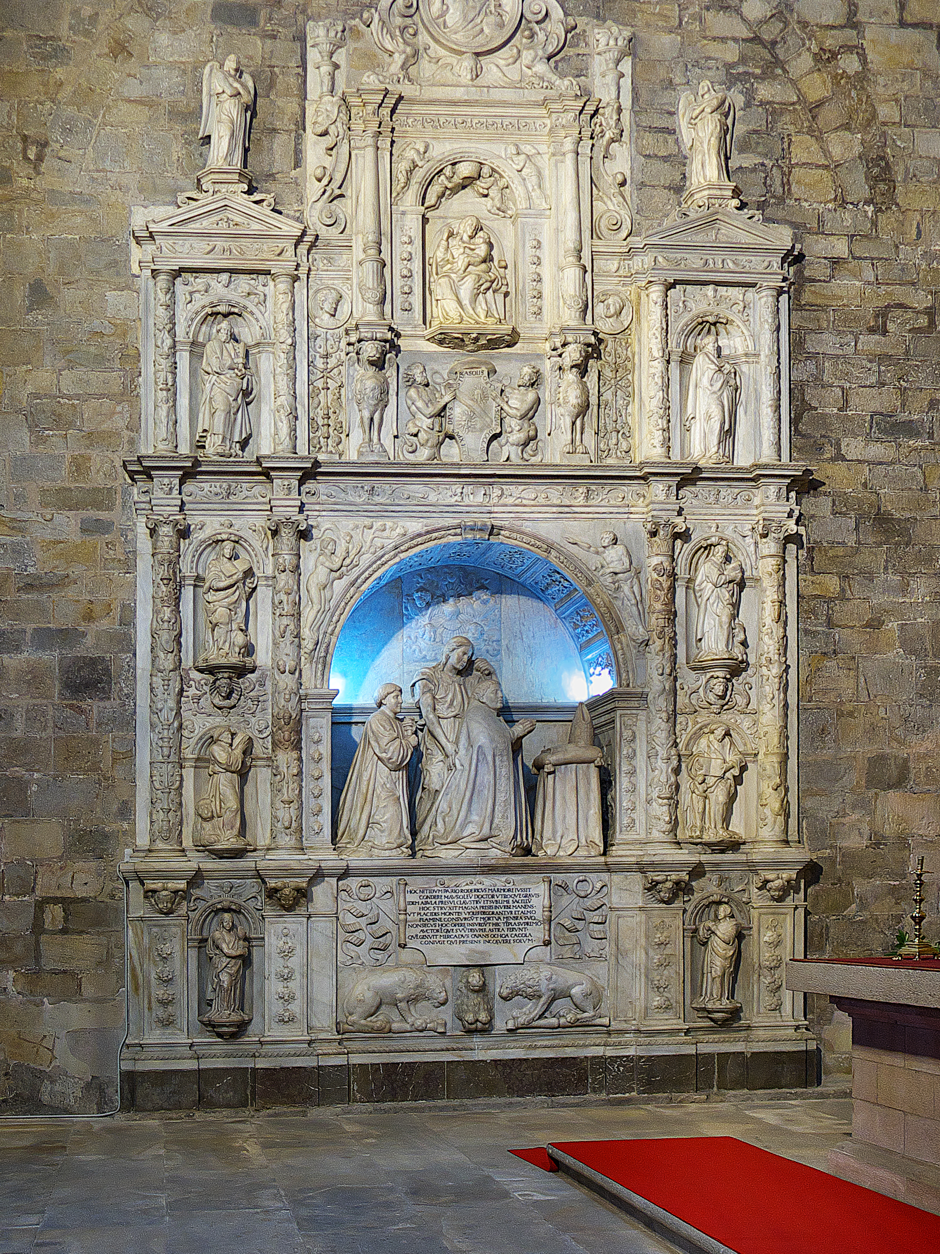 Capilla funeraria de la Piedad, Iglesia de San Miguel (Oñate). El obispo Rodrigo Mercado de Zuazola, siendo Presidente de la Chancillería Real de Granada, contrató, en esta capital, a Diego de Siloe (1528-1529) su mausoleo en mármol granadino, posteriormente trasladado a su Capilla de la Piedad. Entra en el grupo del "nuevo" arte funerario, junto a Domenico Fancelli (1509), arzobispo Diego Hurtado de Mendoza; Antonio Sansovino?, cardenal Pedro González de Mendoza; Aprile de Carona (1520), Pedro Enríquez de Quiñones, o Vasco de la Zarza (1520-1524), obispo Alonso Fernández de Madrigal.